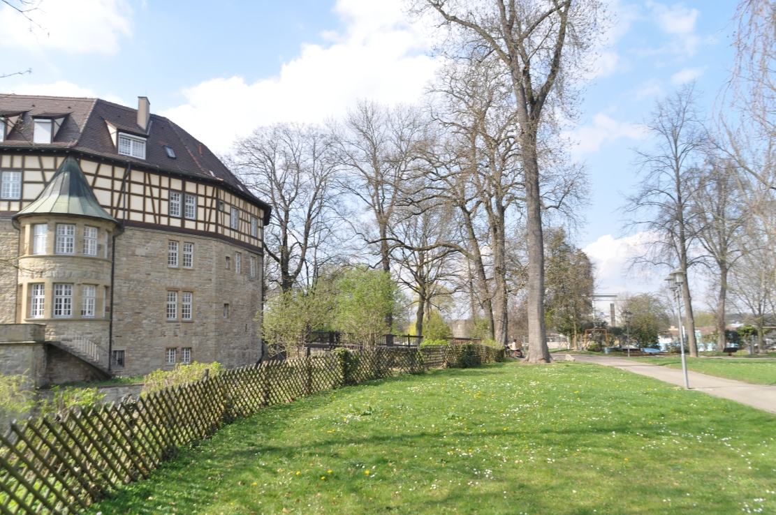 Sachsenheim April 2012